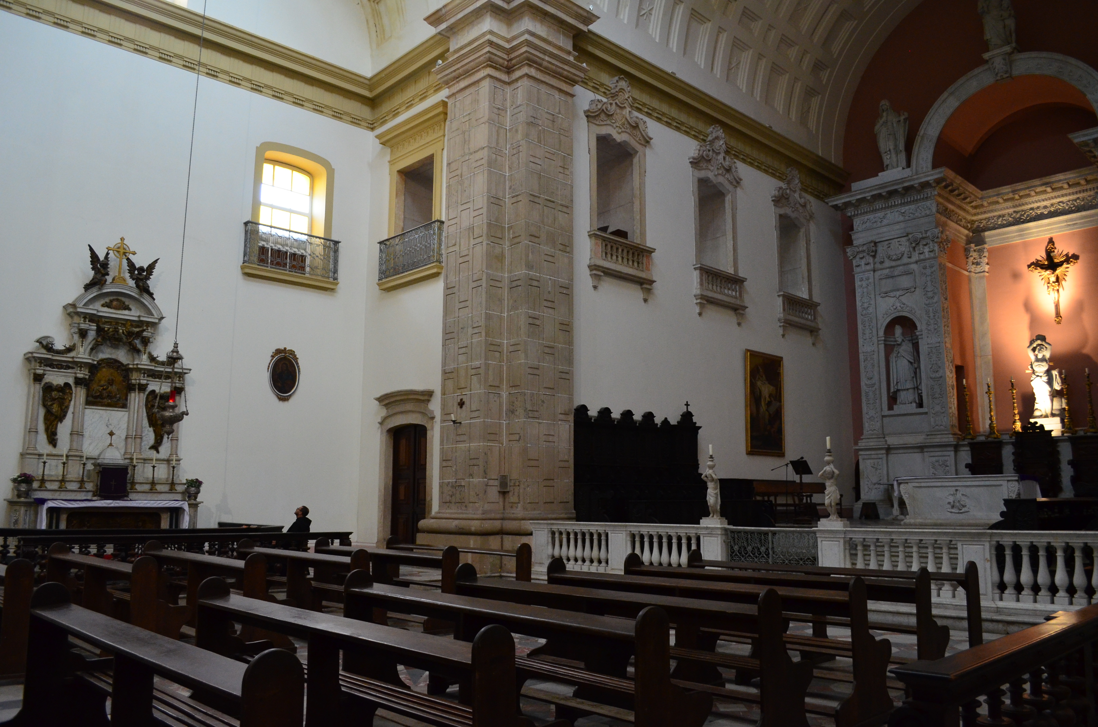 Basílica Arquiabacial de São Sebastião. Foto: Tatiana Azeviche